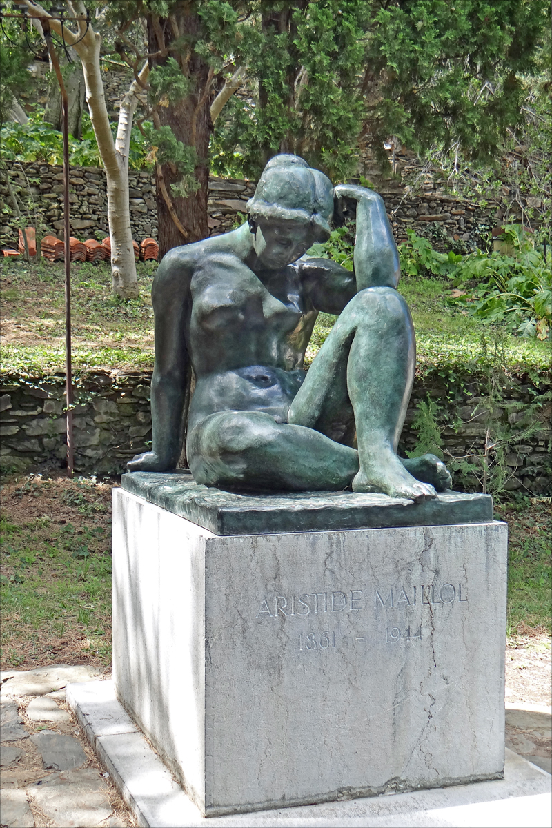 La Méditerranéetitle QS:P1476,fr:"La Méditerranée" label QS:Lfr,"La Méditerranée"